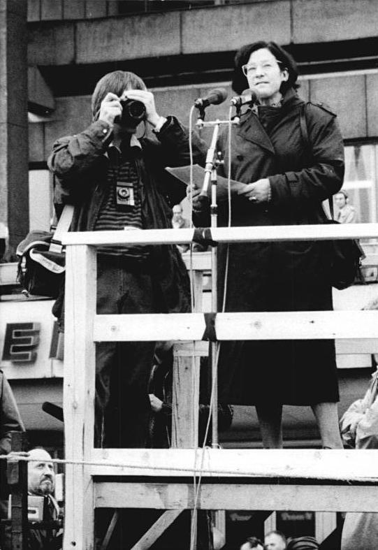 ADN-ZB Link 4.11.1989 Berlin: Demonstration 500.000 Bürger beteiligten sich an einer Demonstration für den Inhalt der Artikel 27 und 28, der Verfassung der DDR. Auf dem anschließenden Meeting auf dem Alexanderplatz, ergriff auch die Schriftstellerin Christa Wolf das Wort.